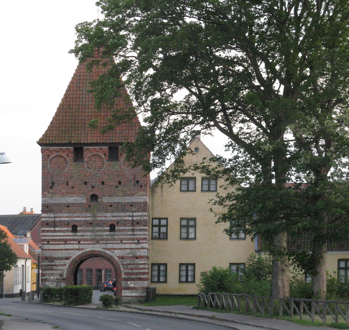 Mølleporten i Stege på Møn, set fra nordøst